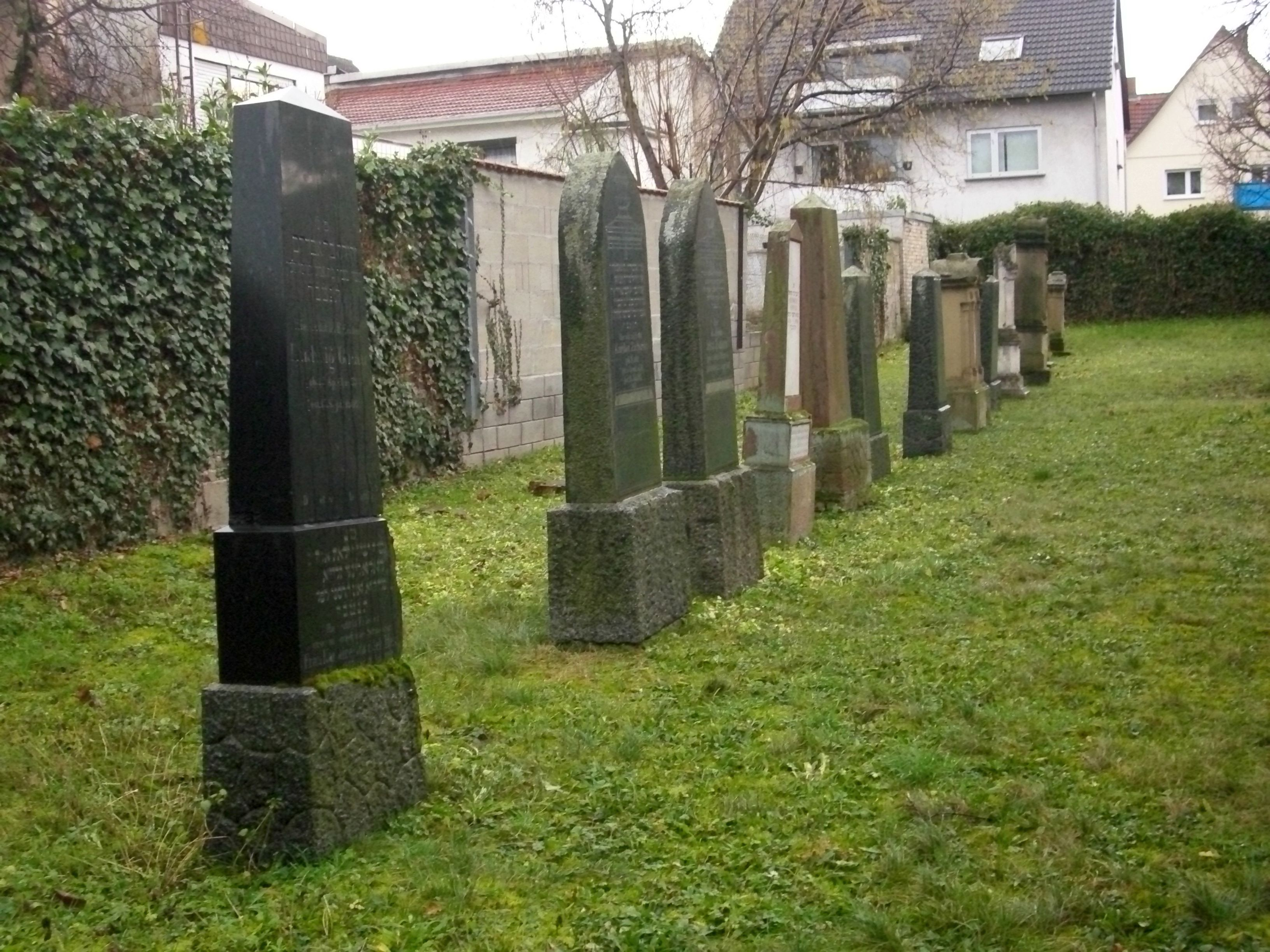 1883 angelegt, teilweise Backsteinmauer, originale Torpfosten; 18 Grabsteine von 1888 bis 1919